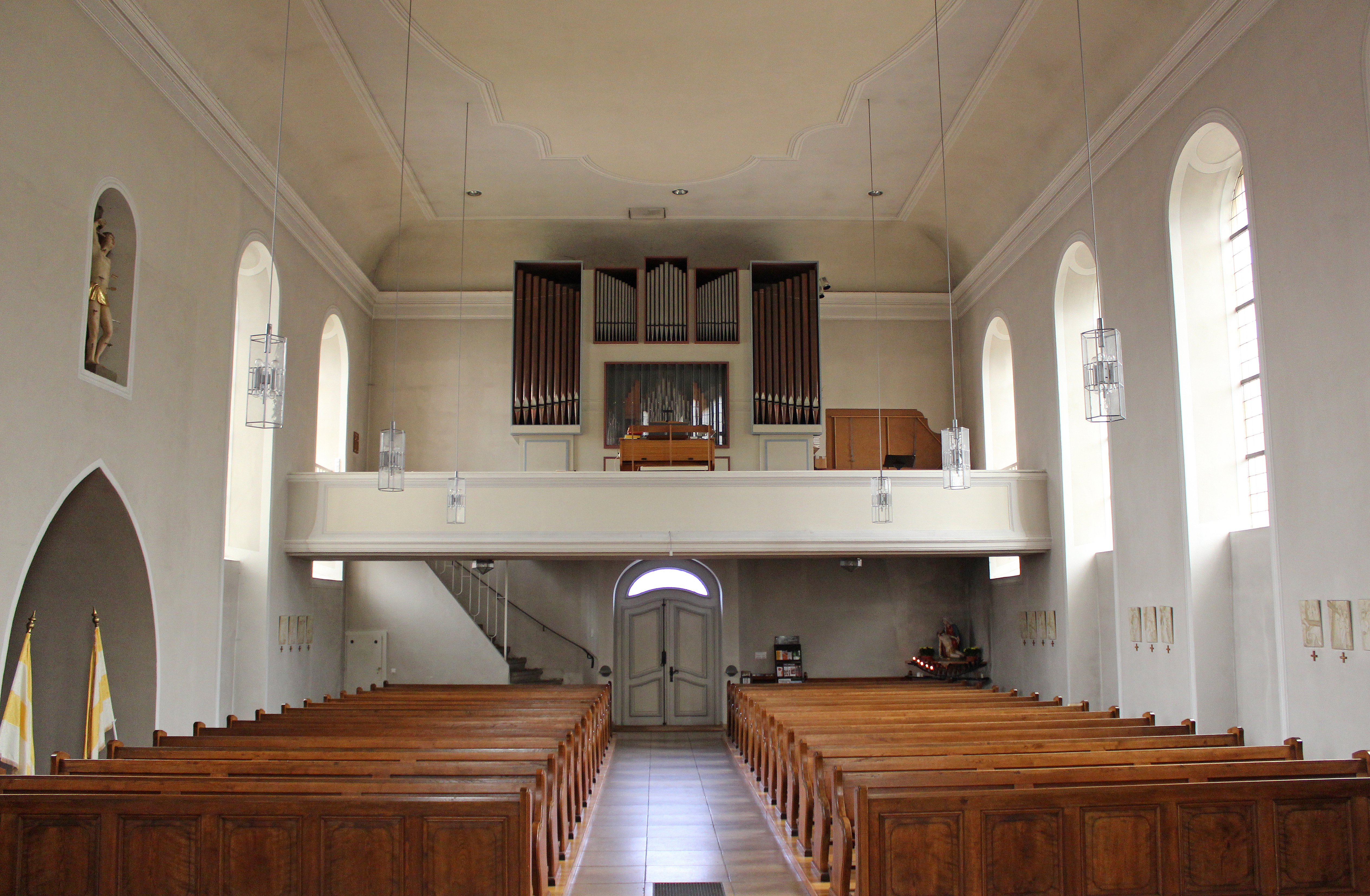 Blick ins Innere der katholischen Pfarrkirche St. Markus in Reinheim, Gemeinde Gersheim, Saarland